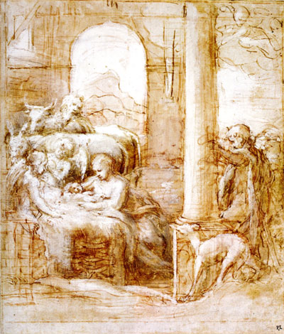 Correggio, disegno preparatorio della notte, cambridge